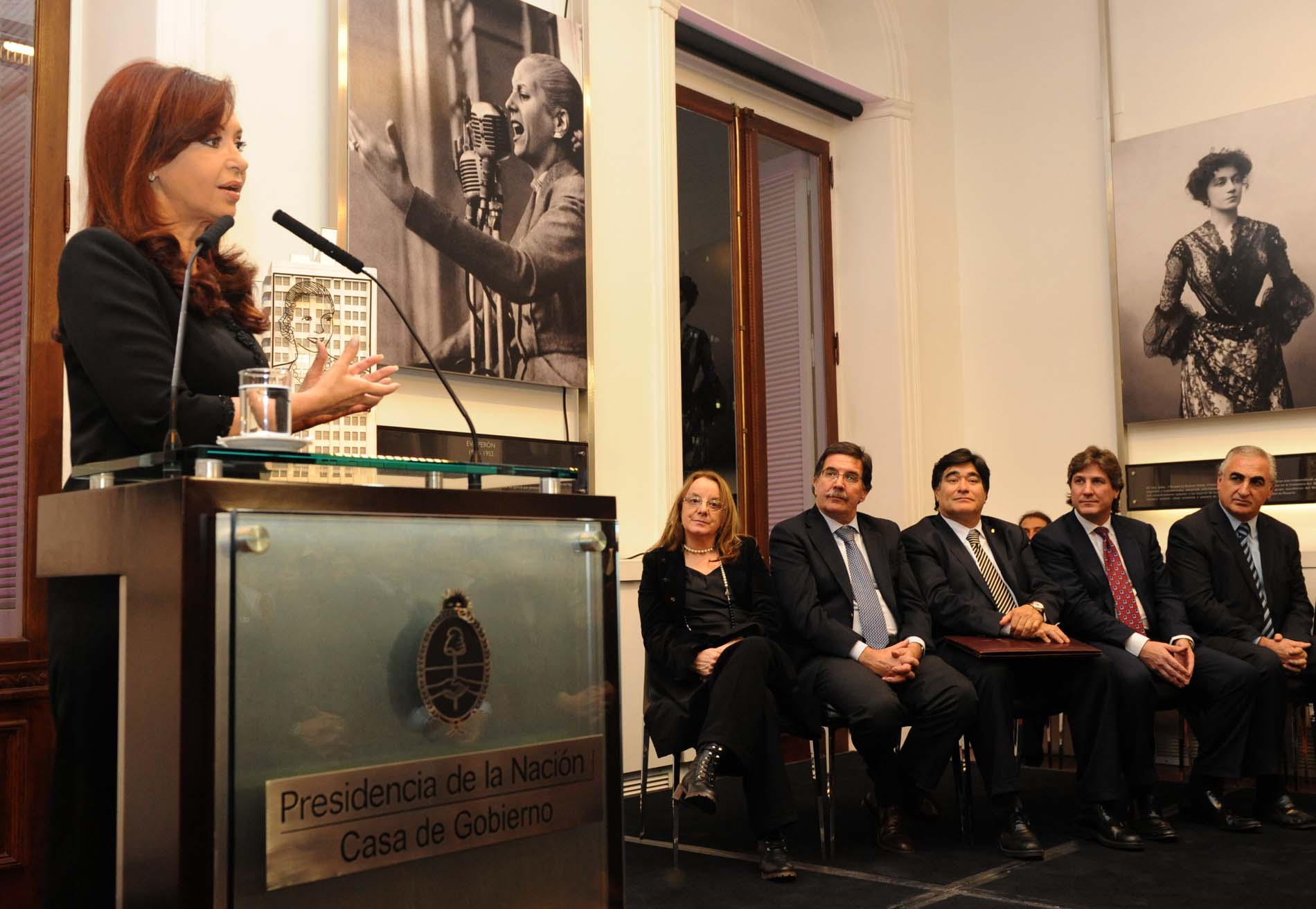 Cristina Fernández de Kirchner en el acto de promulgación de la Ley Nacional Anti-Tabaco.